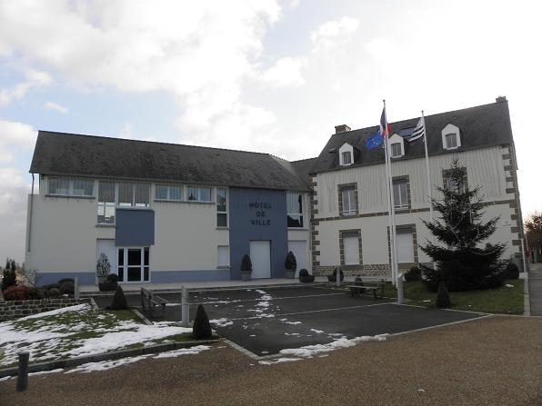 Mairie de Lécousse (Ille-et-Vilaine, France).